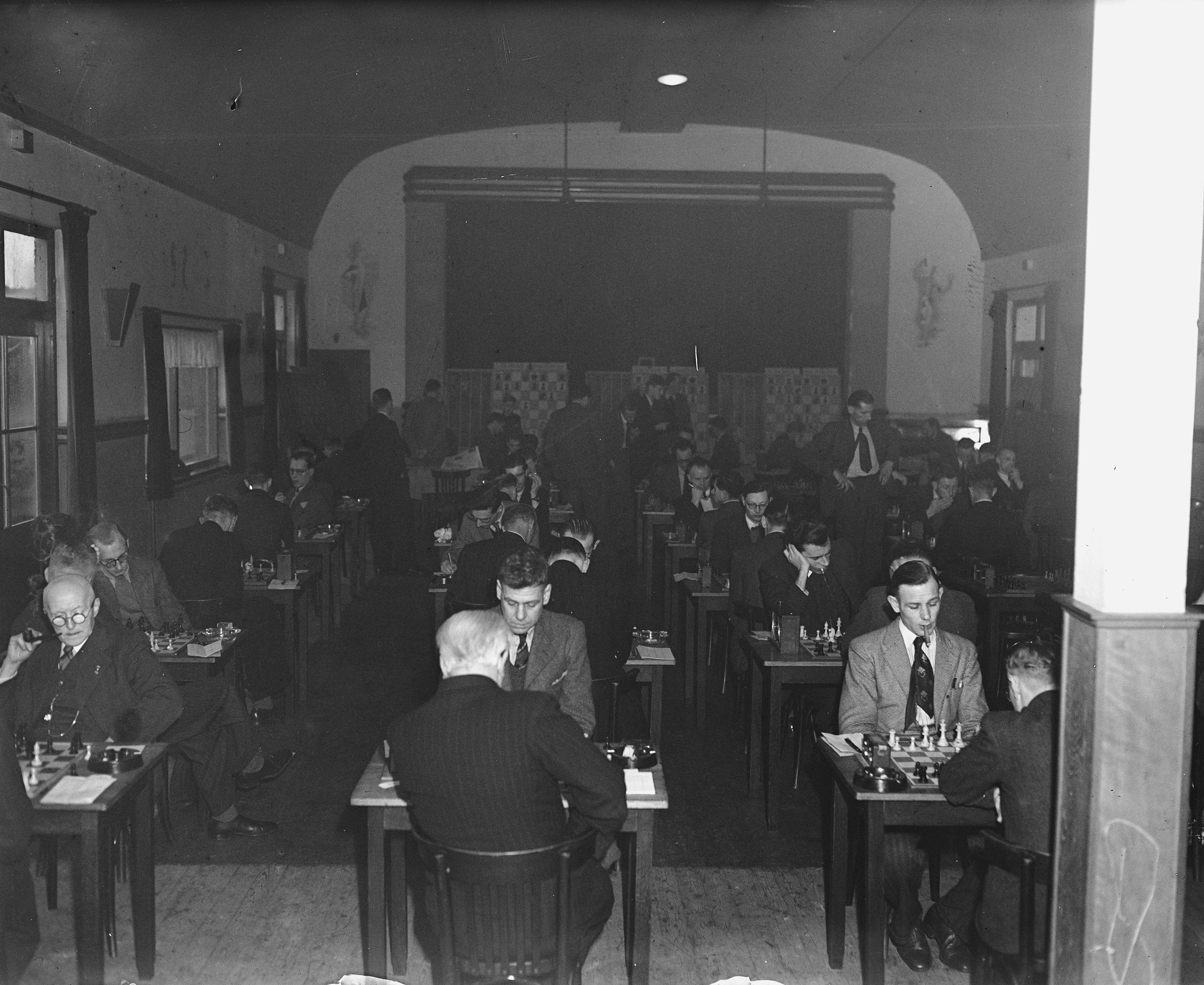 Collectie / Archief : Fotocollectie Anefo Reportage / Serie : [ onbekend ] Beschrijving : Hoogovenschaaktoernooi. / Datum : 6 januari 1948 Trefwoorden : overzichten Instellingsnaam : Hoogovenschaaktournooi Fotograaf : Snikkers, […] / Anefo Auteursrechthebbende : Nationaal Archief Materiaalsoort : Glasnegatief Nummer archiefinventaris : bekijk toegang 2.24.01.09 Bestanddeelnummer : 902-5359